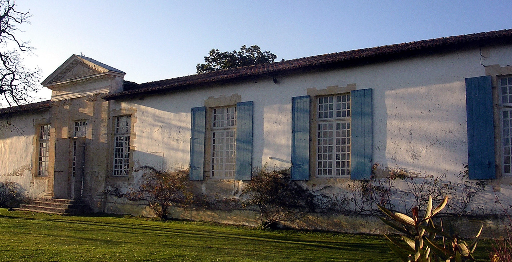 Château de Gaujacq, dans les Landes (France)